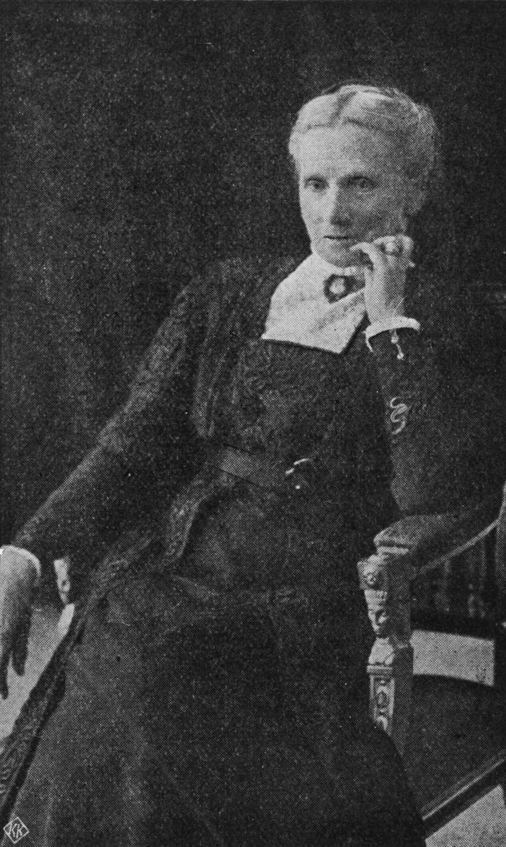 Hotelleier Anne Kure (1845-1914)